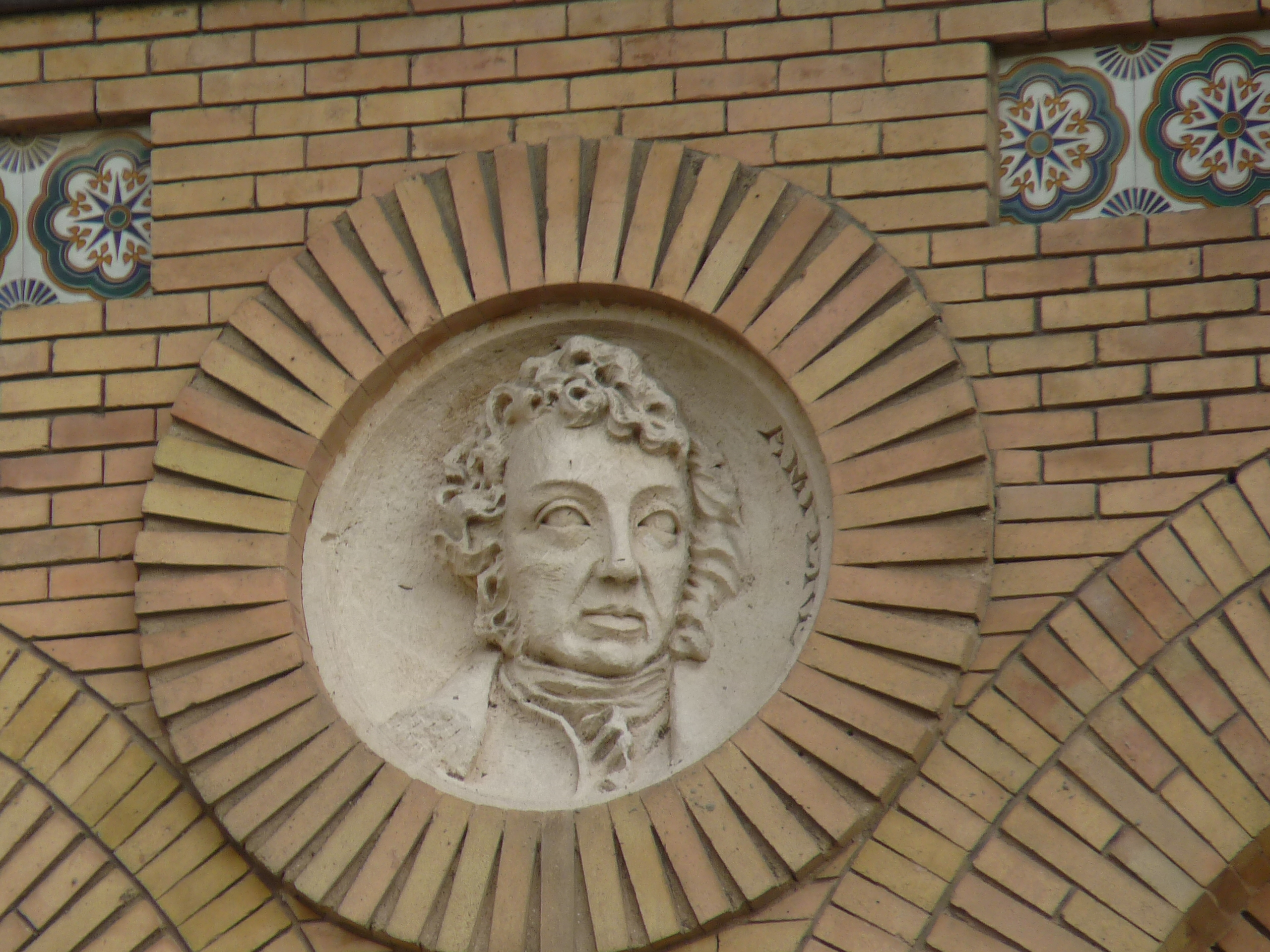 Zaragoza - Antigua Facultad de Medicina - Medallón - Jean-Marie Ampère